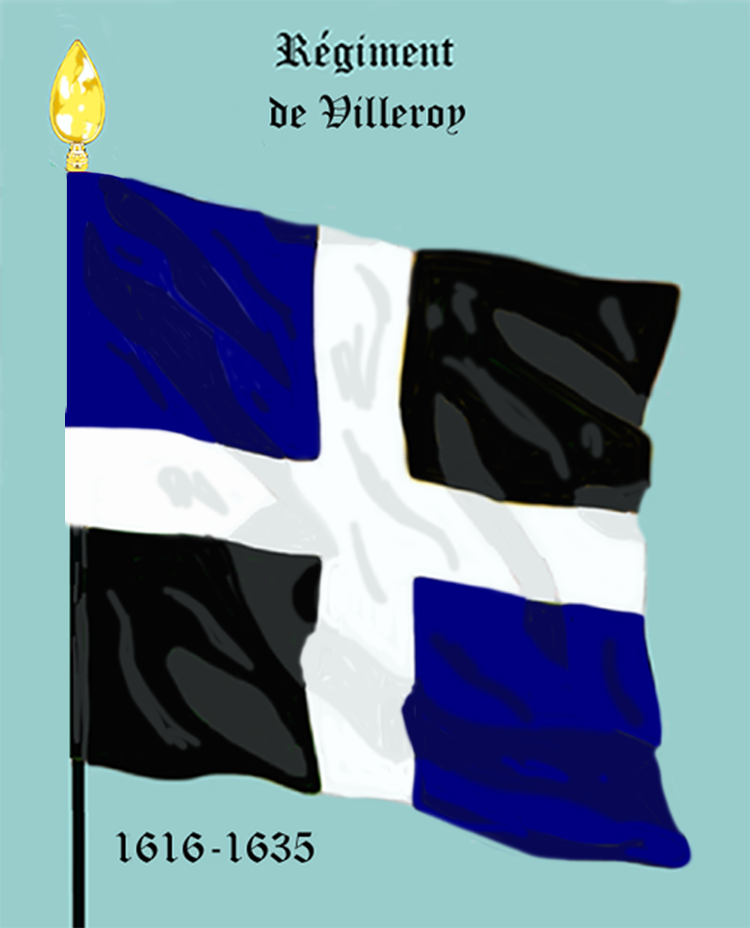 Ordonnanzfahne eines königlich französischen Infanterie-Regiments. - Entnommen und überarbeitet aus: „LES UNIFORMES ET LES DRAPEAUX DE L'ARMÉE DU ROI“ Marseille 1899. (Drapeau d'Ordonnance d' un régiment française d'infanterie royale.)